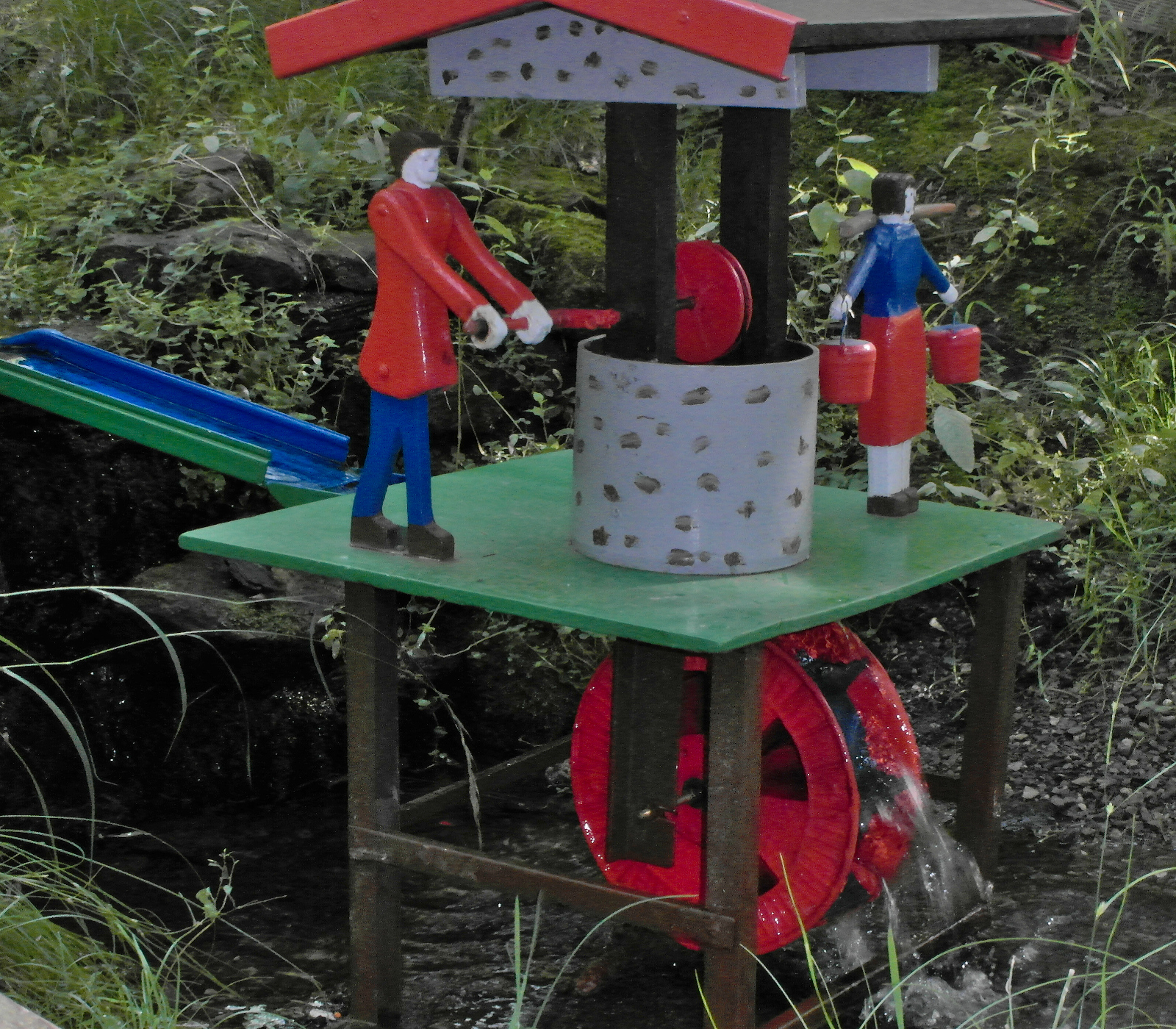 Die Modelle der Wennigser Wasserräder werden jährlich in oft überarbeitetem Design aufgebaut.